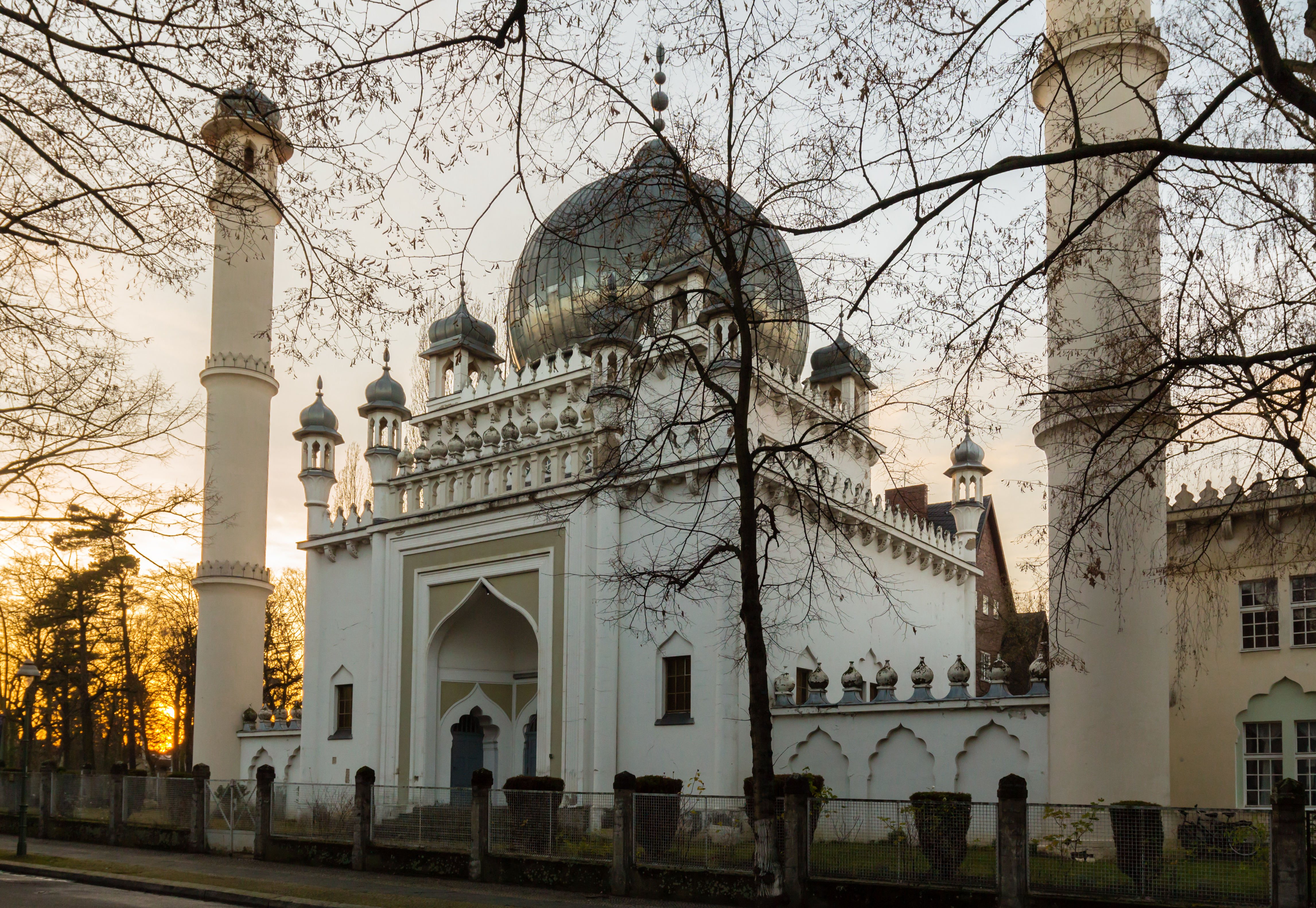 Wilmersdorfer Moschee